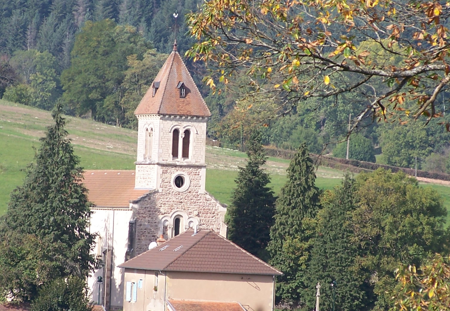 Eglise de Châtenay sous Dun du XIXe siècle.